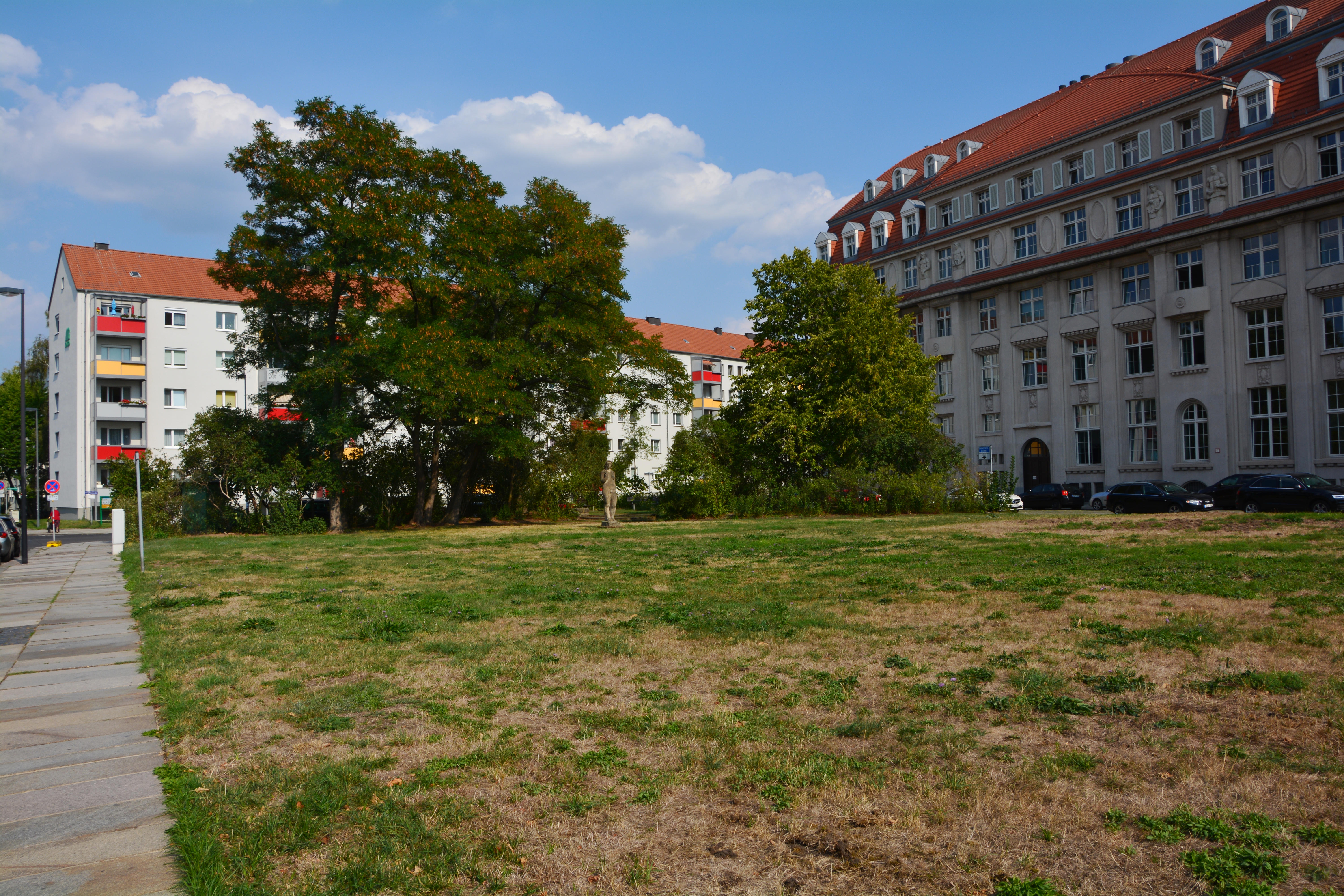 Denkmal geschütztes Gebäudeensemble Sternplatz Dresden. Grünfläche